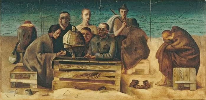 Prisoners in Saint-Cyprien, 1942 painting by Felix Nussbaum